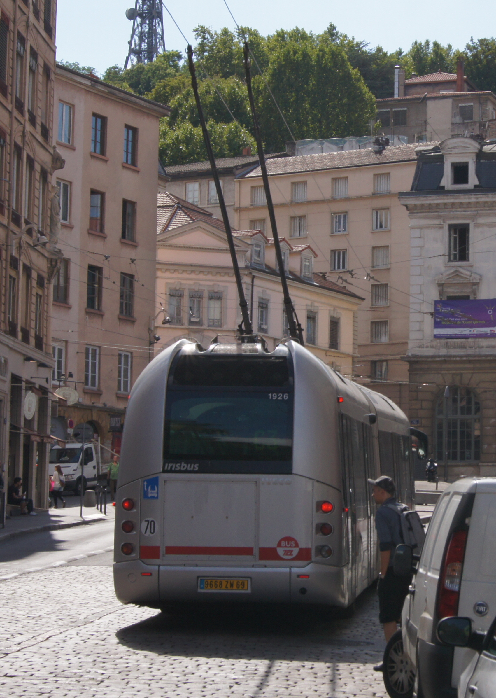 Arrière d'un trolleybus Cristalis ETB 18 à Lyon-St-Paul